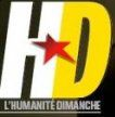 Capçalera del setmanari "L'humanité dimanche", del diari francès "L'Humanité"